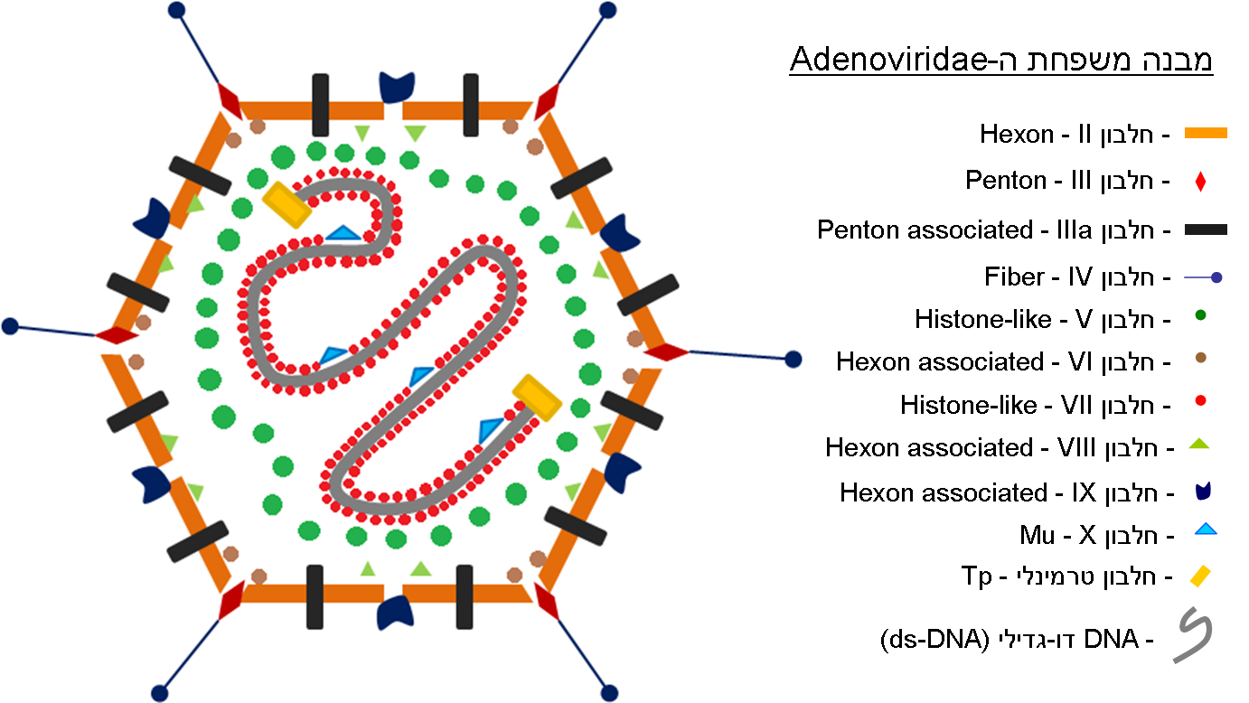 איור הקובץ :קובץ:Adeno structure.JPG